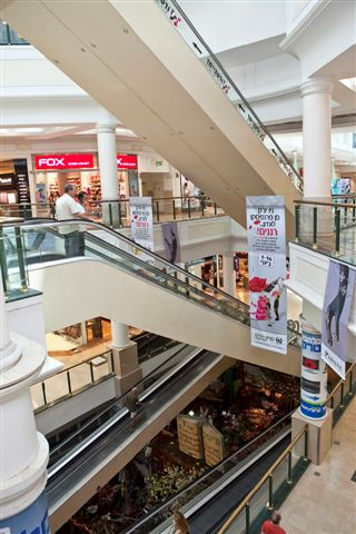 קניון רננים מבפנים